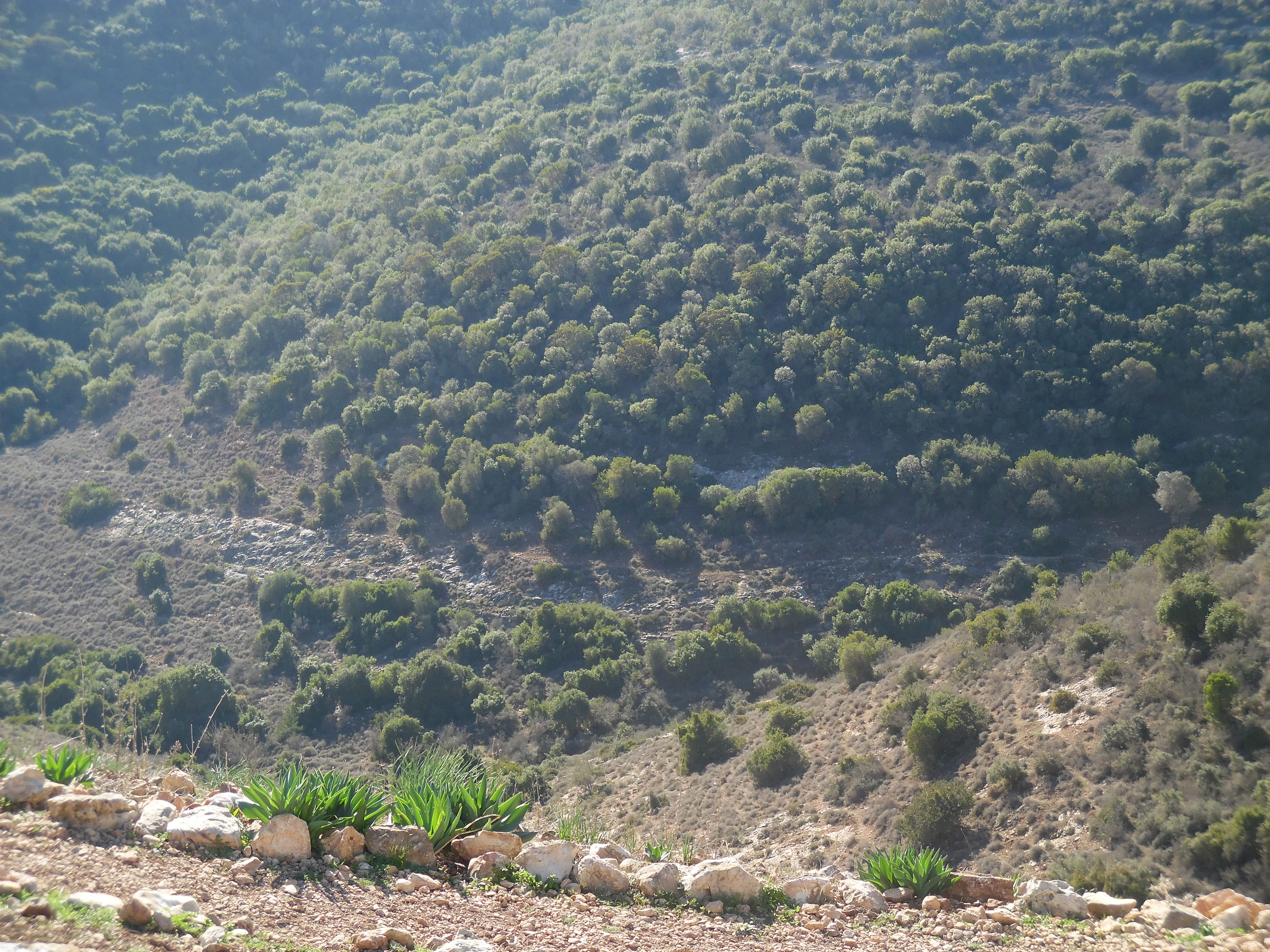 הר עצמון, נוף טיפוסי 2015